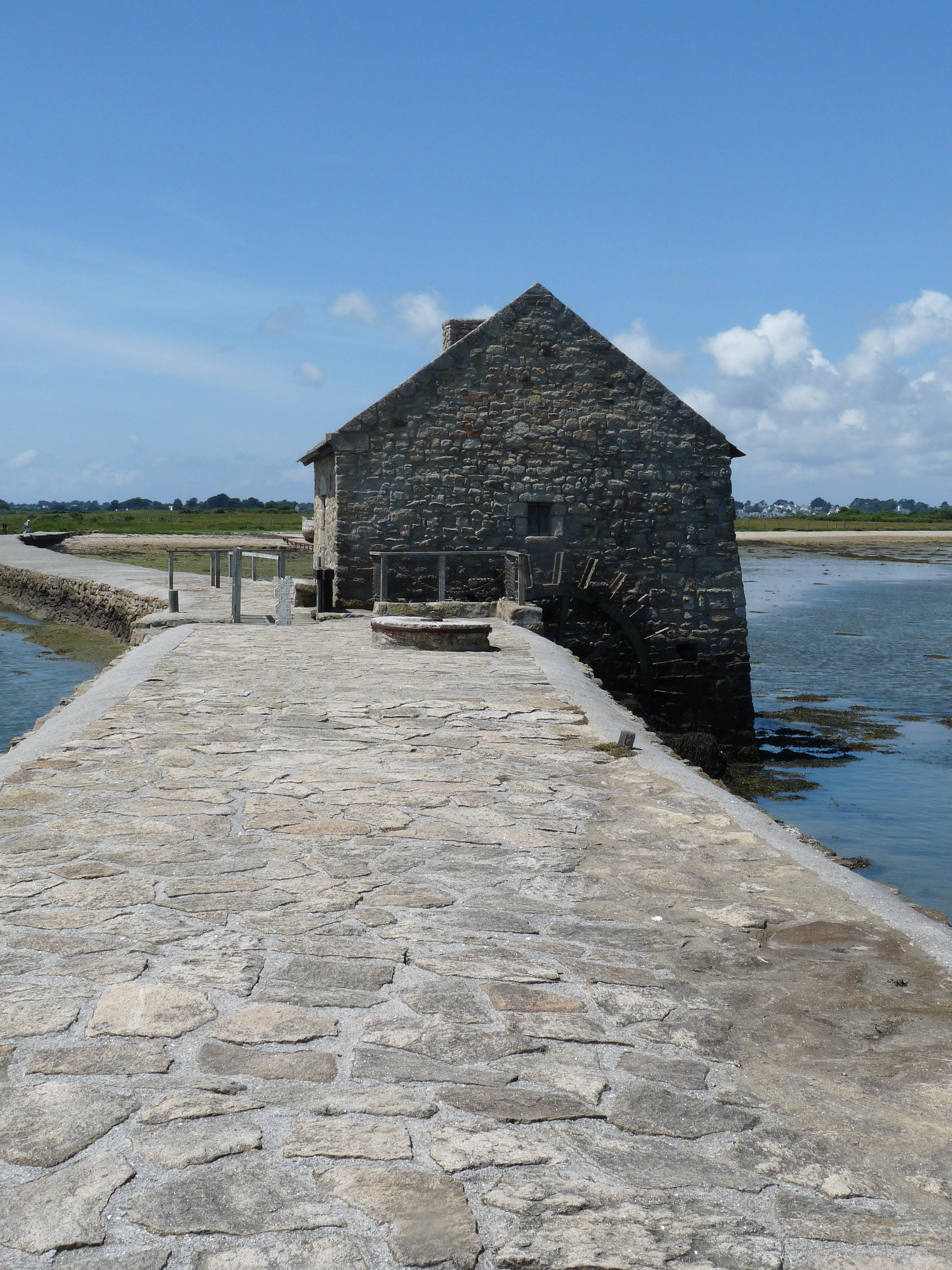 Moulin à marée de l'Île-d'Arz (Morbihan)